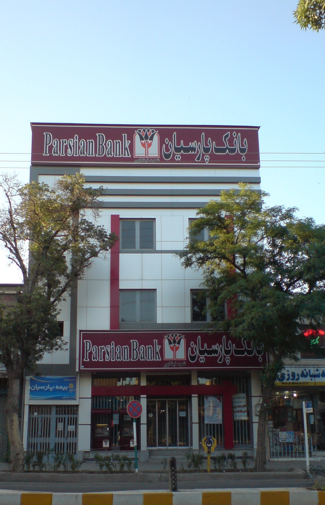 Parsian_Bank-Nishapur